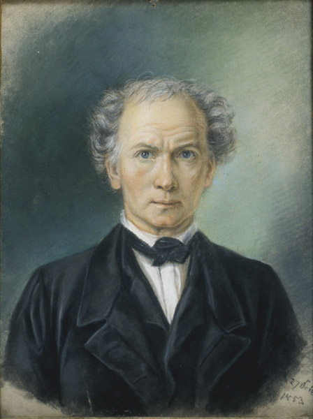 Maalikunstnik ja graafik August Georg Wilhelm Pezoldi autoportree. Pastell, 1855.